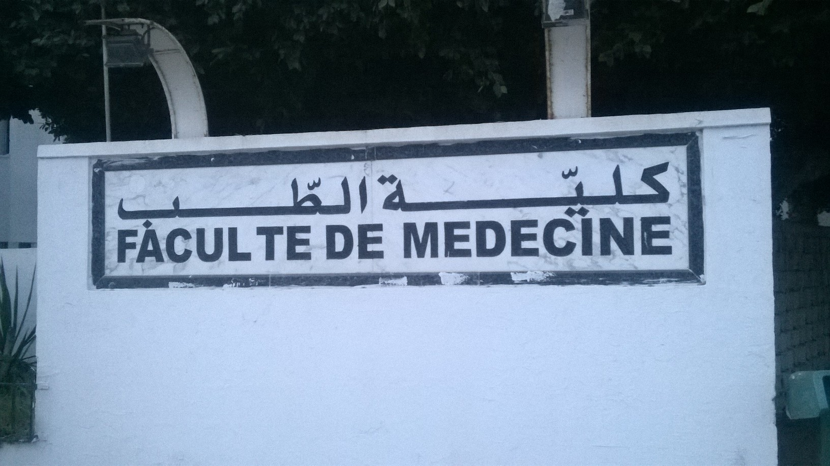 Monastir, Tunisie المنستير، تونس